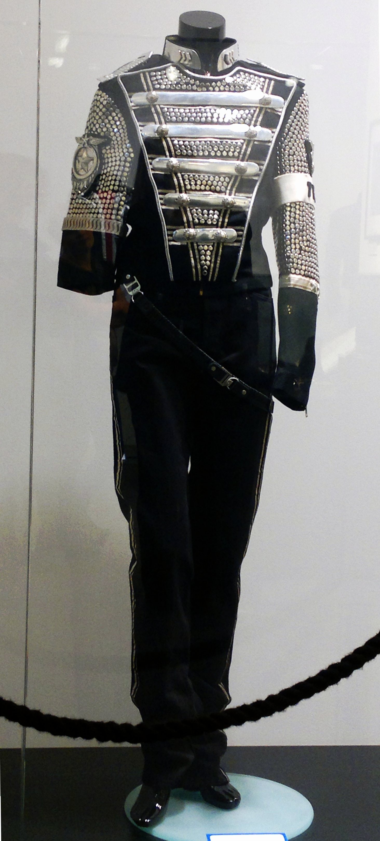 El traje usado para el video promocional del álbum HIStory expuesto en la exhibicion immortal tour del Cirque du soleil.